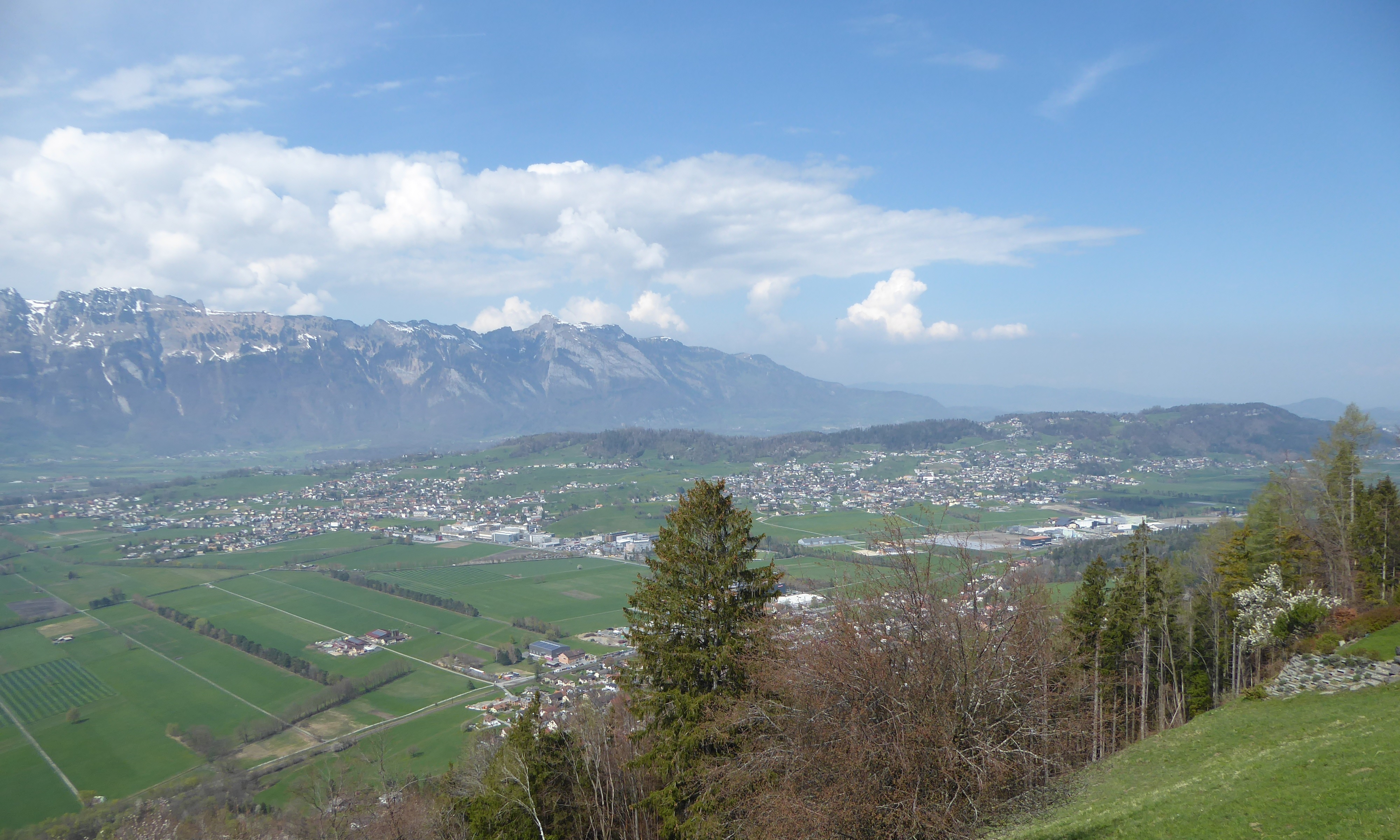 Blick von Planken auf den Eschnerberg, im Hintergrund Kreuzberge und Hoher Kasten